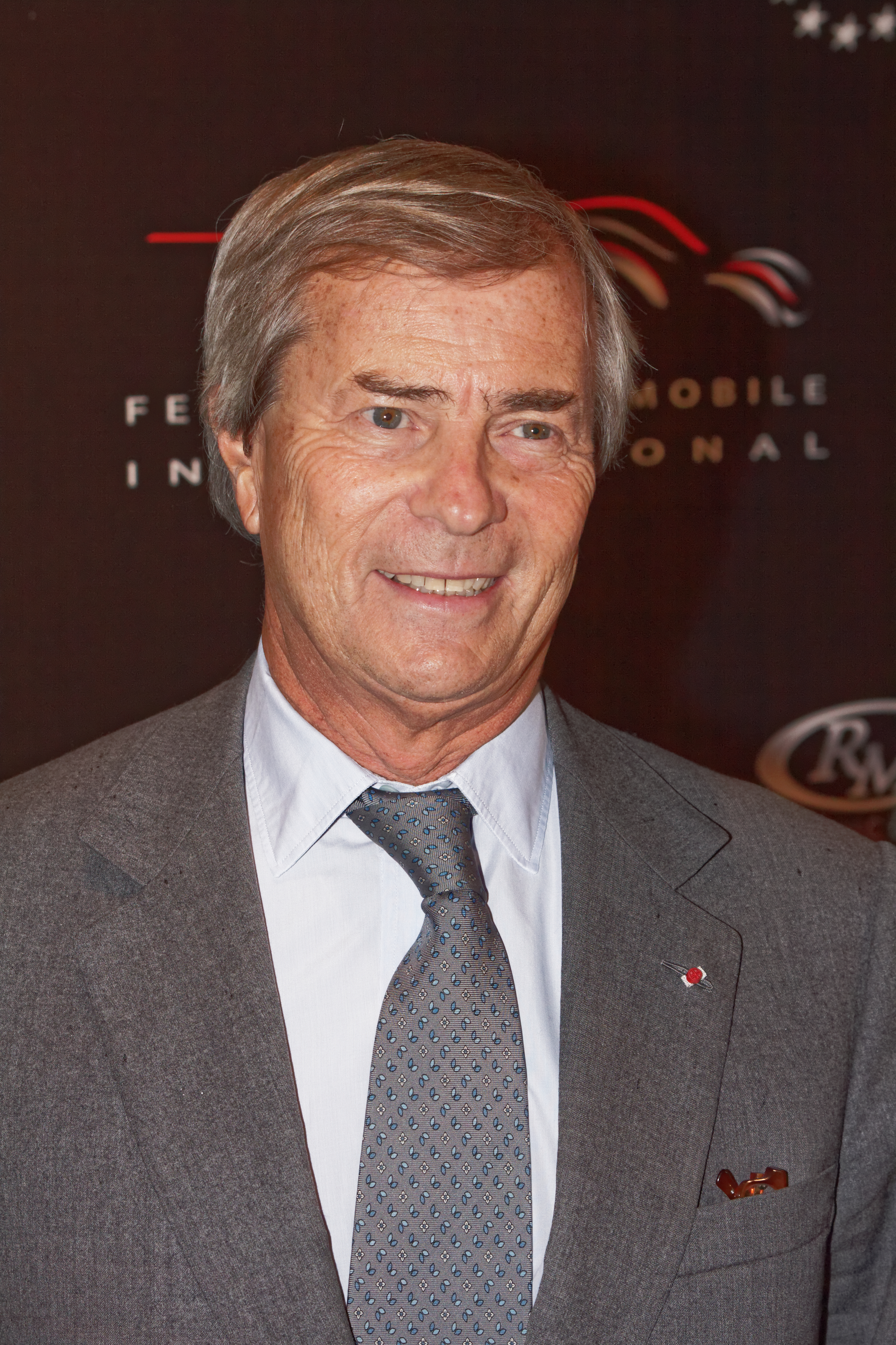 Photocall du festival automobile international 2014.